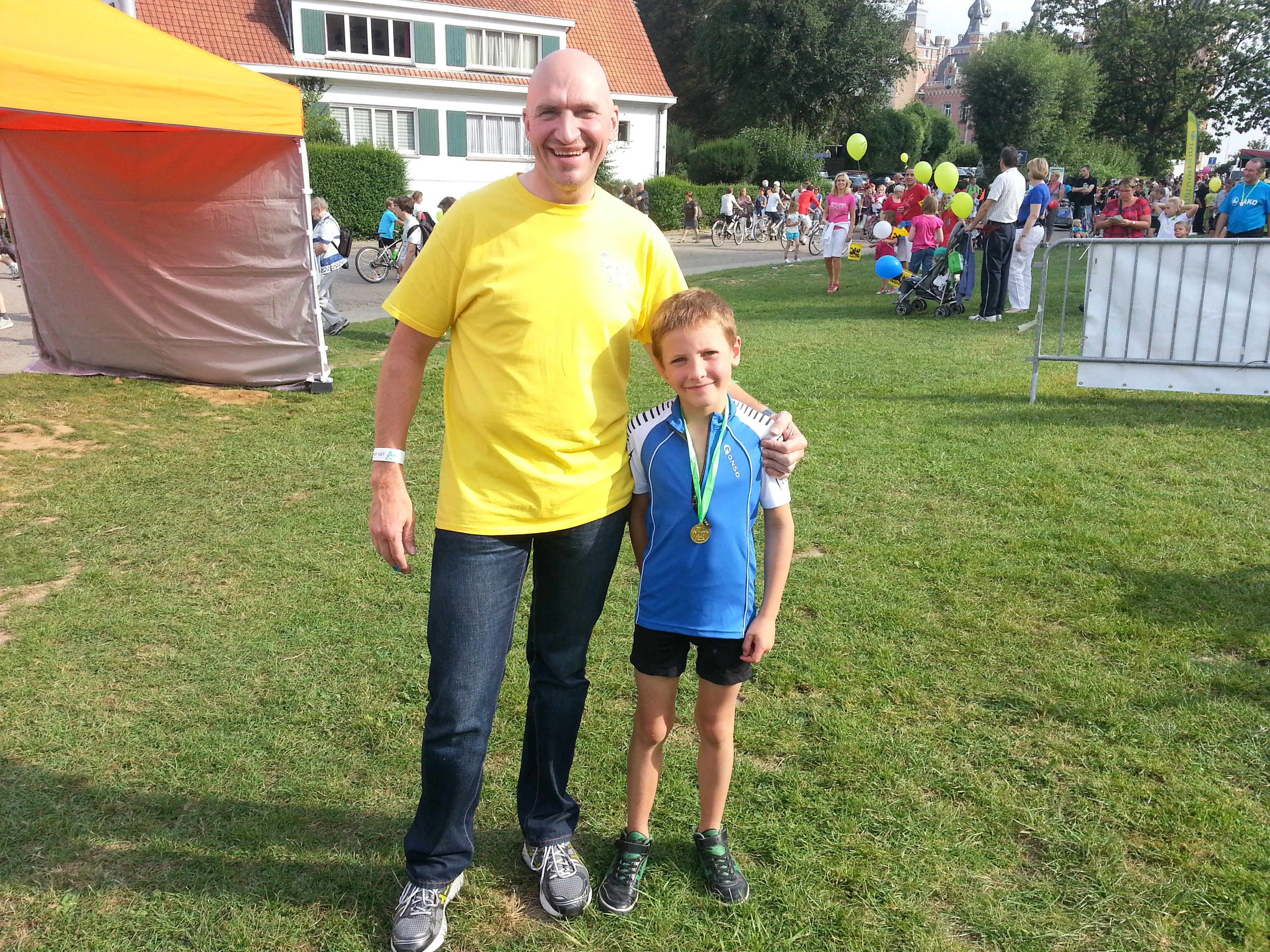 Portret van Ludo Dierckxsens met mijn zoon Joris, na het fietsevenement "De Gordel" in Dilbeek.